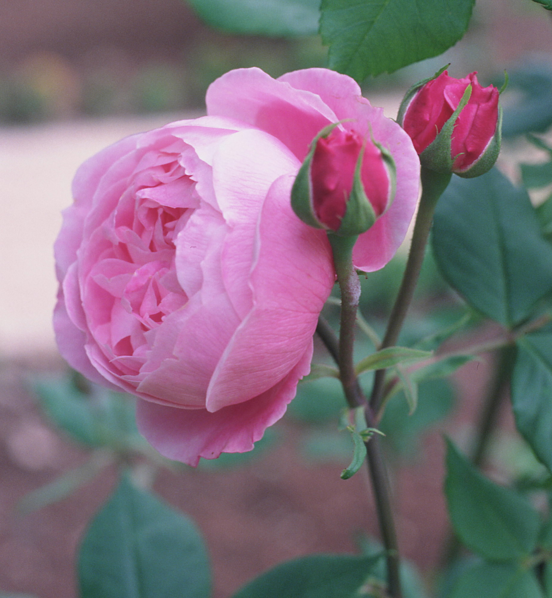 Rosa 'La Reine Victoria', gr. Borbonianas, sect. Chinensis. Real Jardín Botánico, Madrid